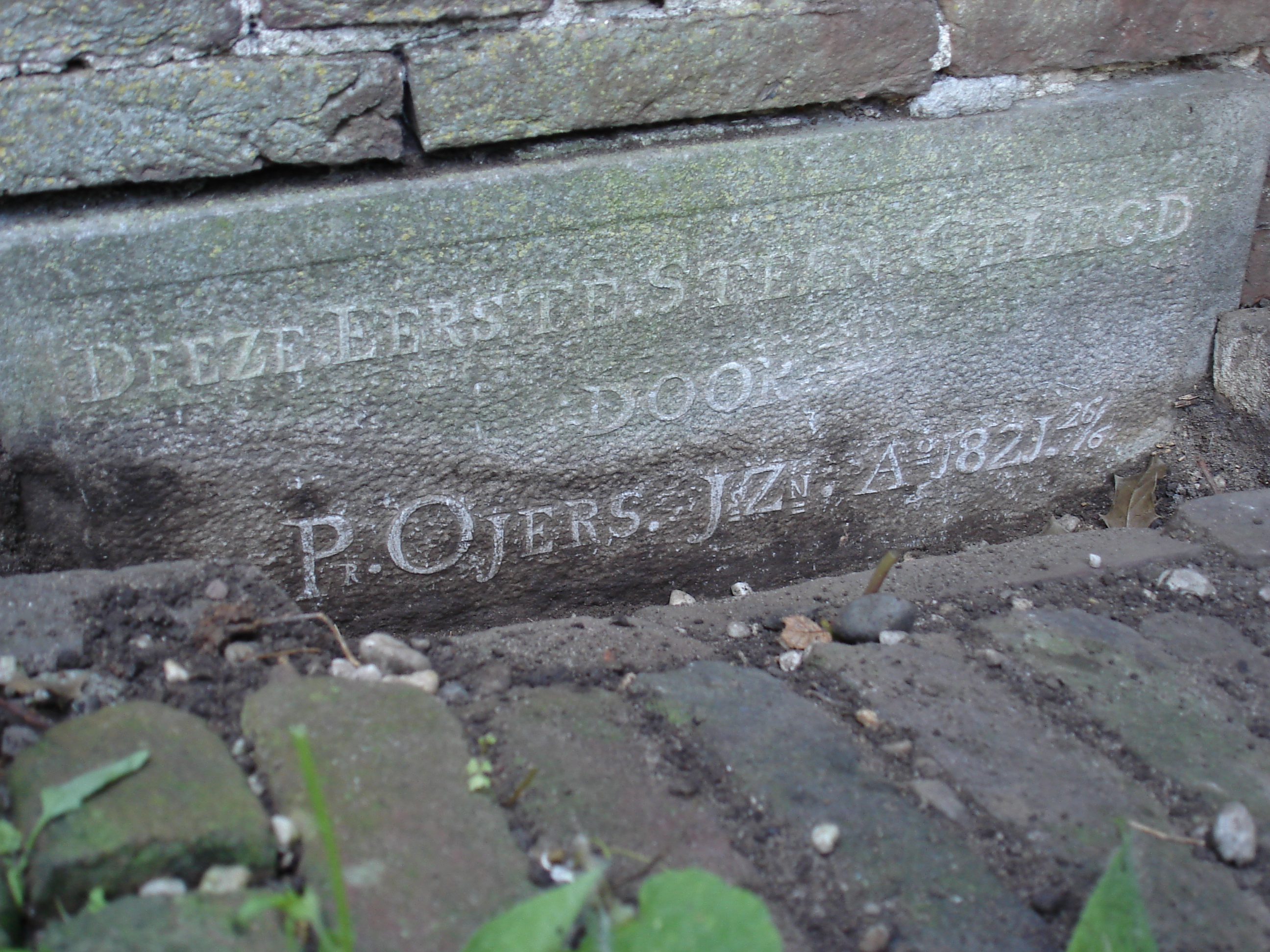 De Eerste steen van boerderij Ojerslust te Willeskop.